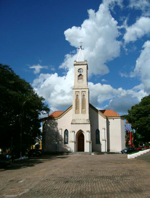 Igreja Matriz de Indiana